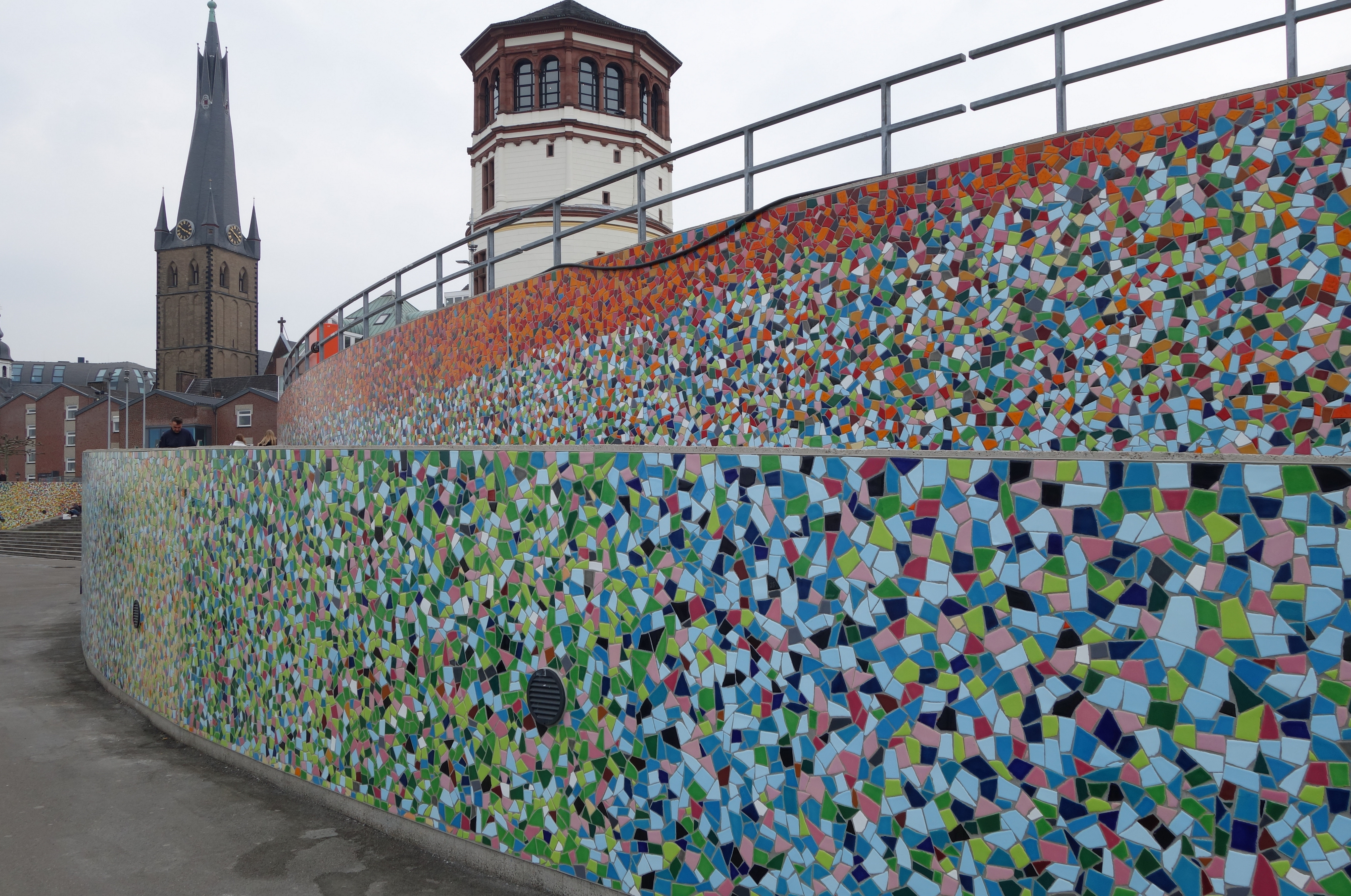 Düsseldorf, neues Mosaik von Hermann-Josef Kuhna an der Freitreppe zum Rhein. Unmittelbar nach der Fertigstellung.